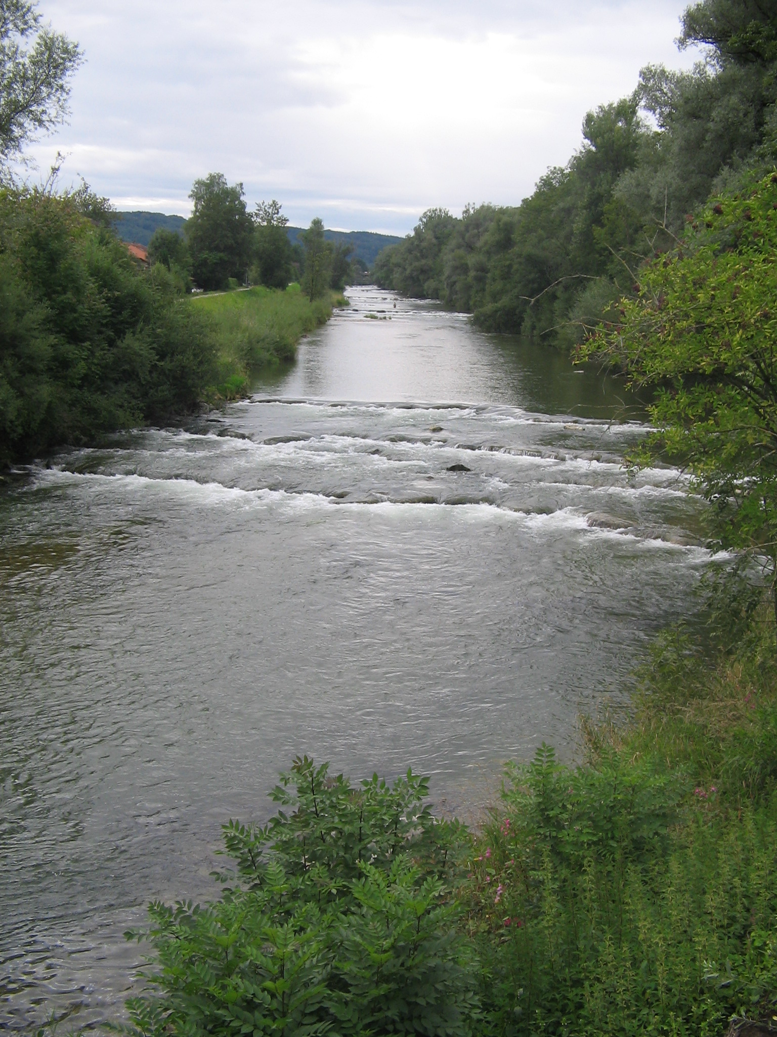 So fließt die Mangfall durch Bruckmühl